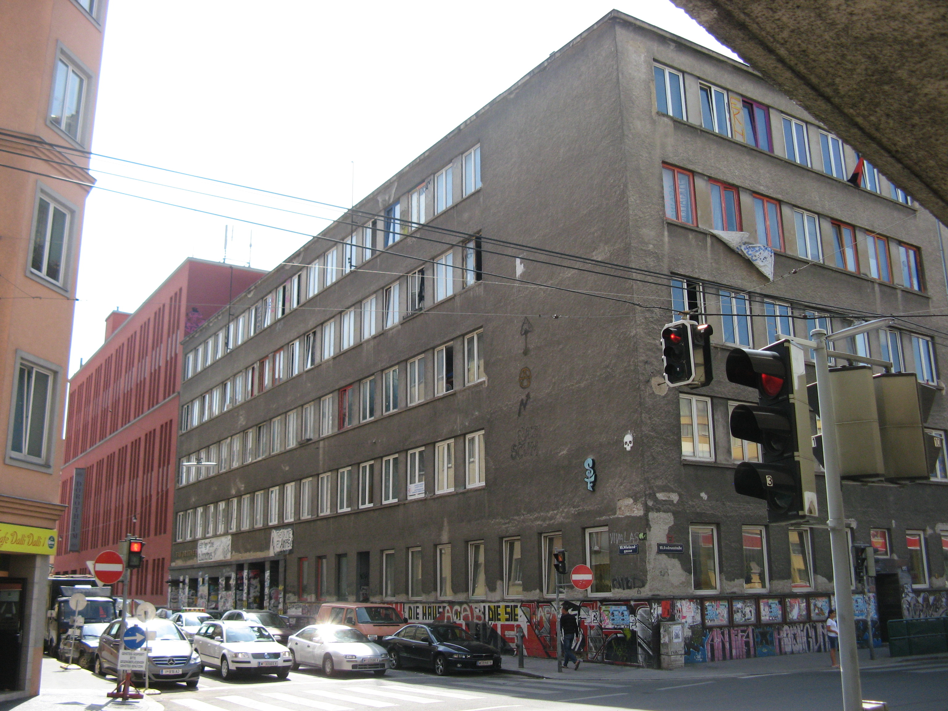 Favoritner Arbeiter-Club (1931) von Josef Hofbauer und Wilhelm Baumgarten, Wielandgasse 2-4, Wien-Favoriten